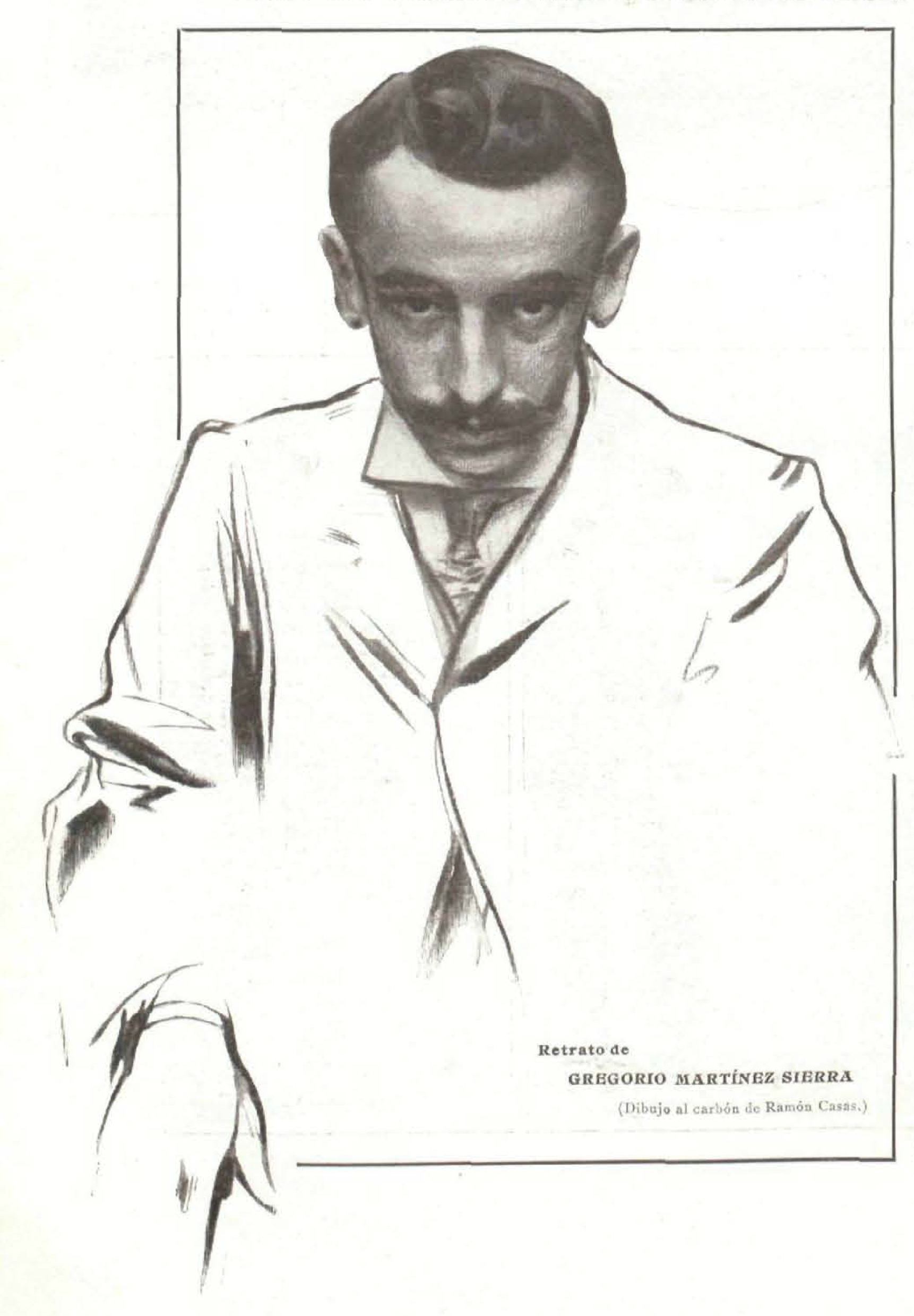 Retrato de Gregorio Martínez Sierra. Dibujo al carbón de Ramón Casas.